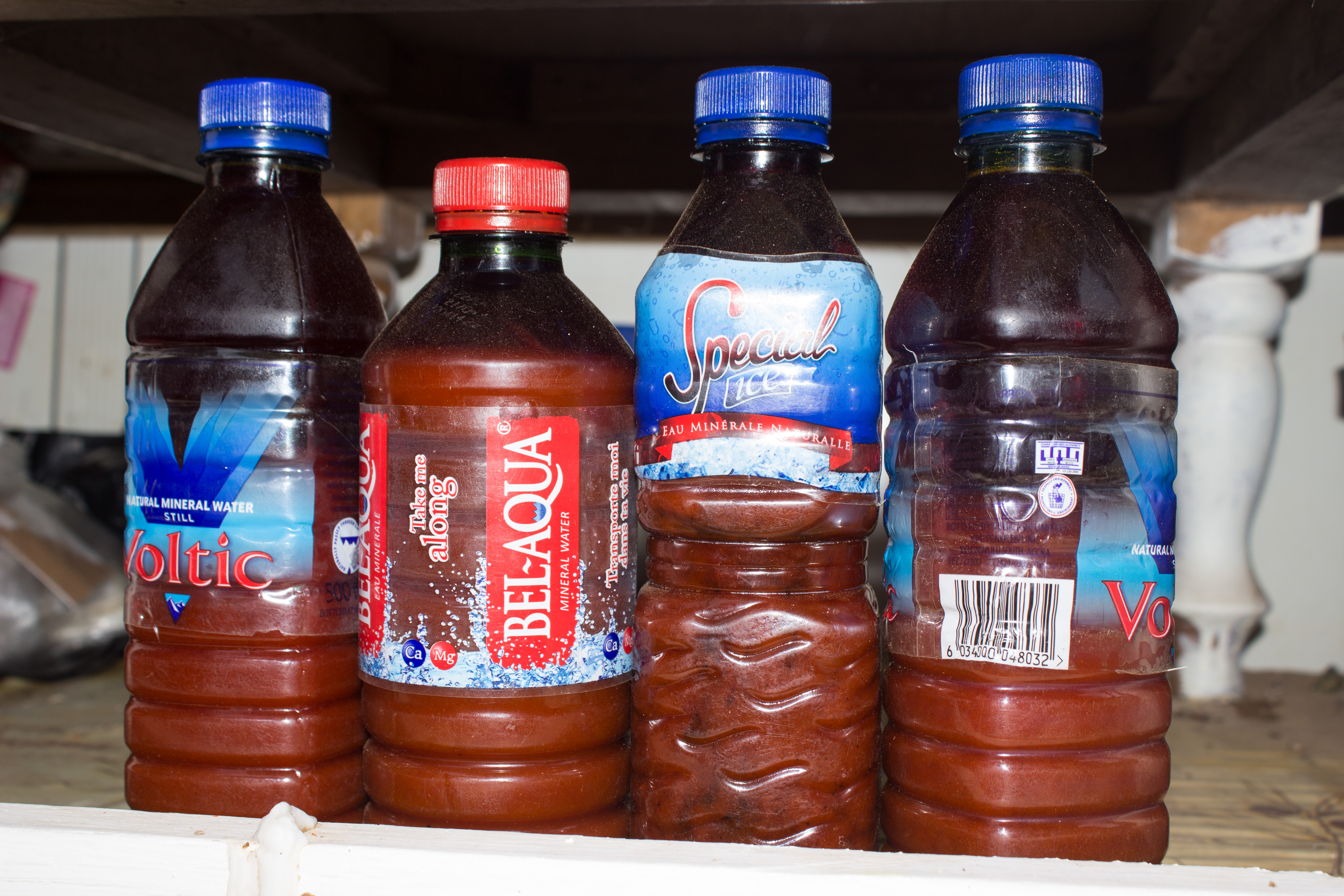 Sebstproduziertes Palmöl in Mineralwasserflaschen This is an image of food from Ghana